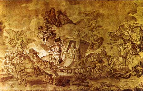 O atentado sofrido pelo rei José I de Portugal em 1758.